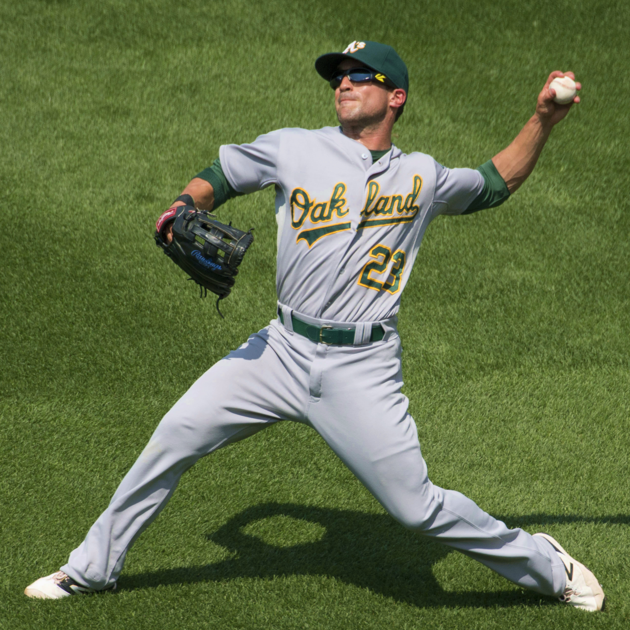 Sam Fuld